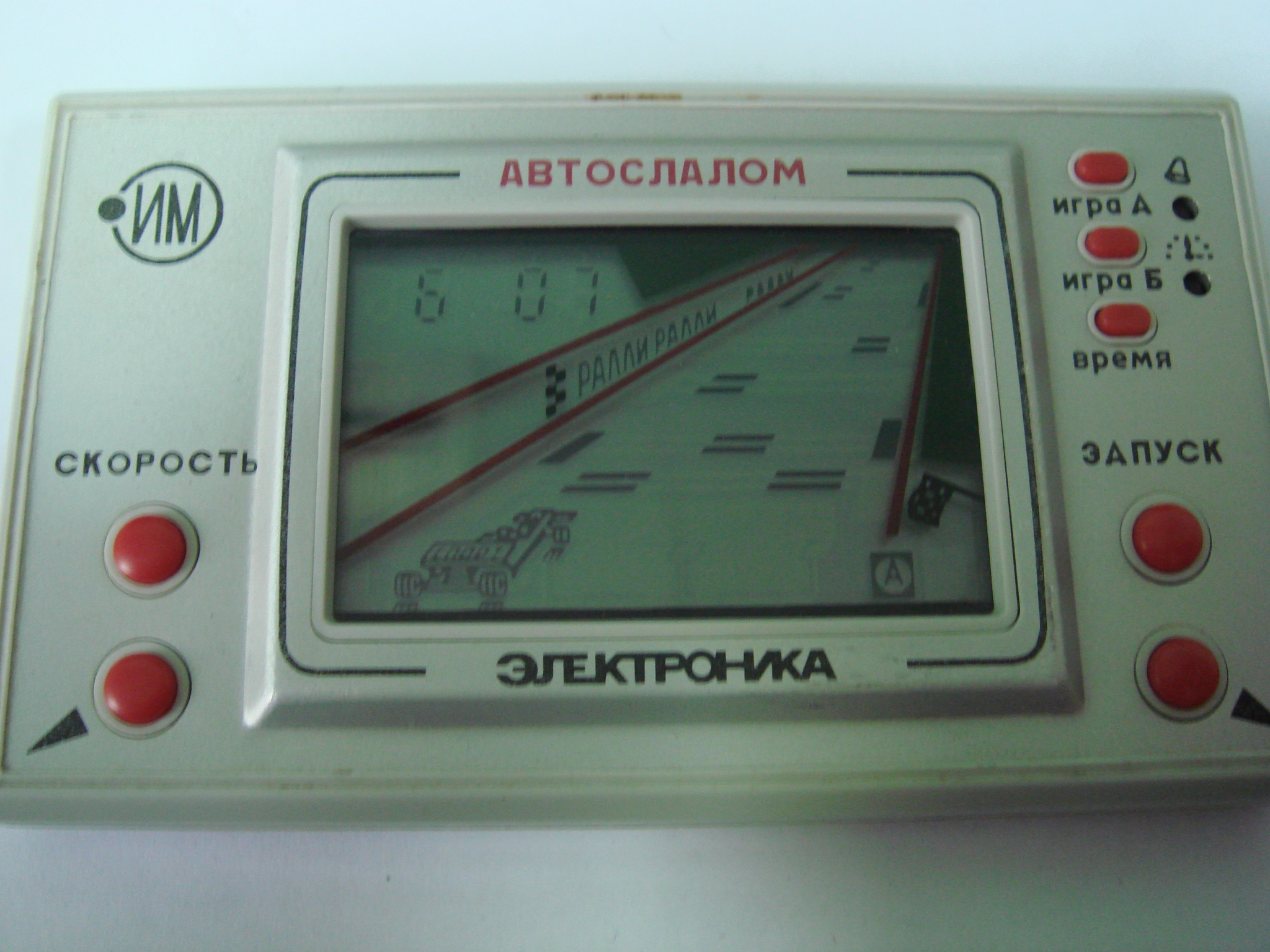 Карманная игра "Электроника ИМ-23"